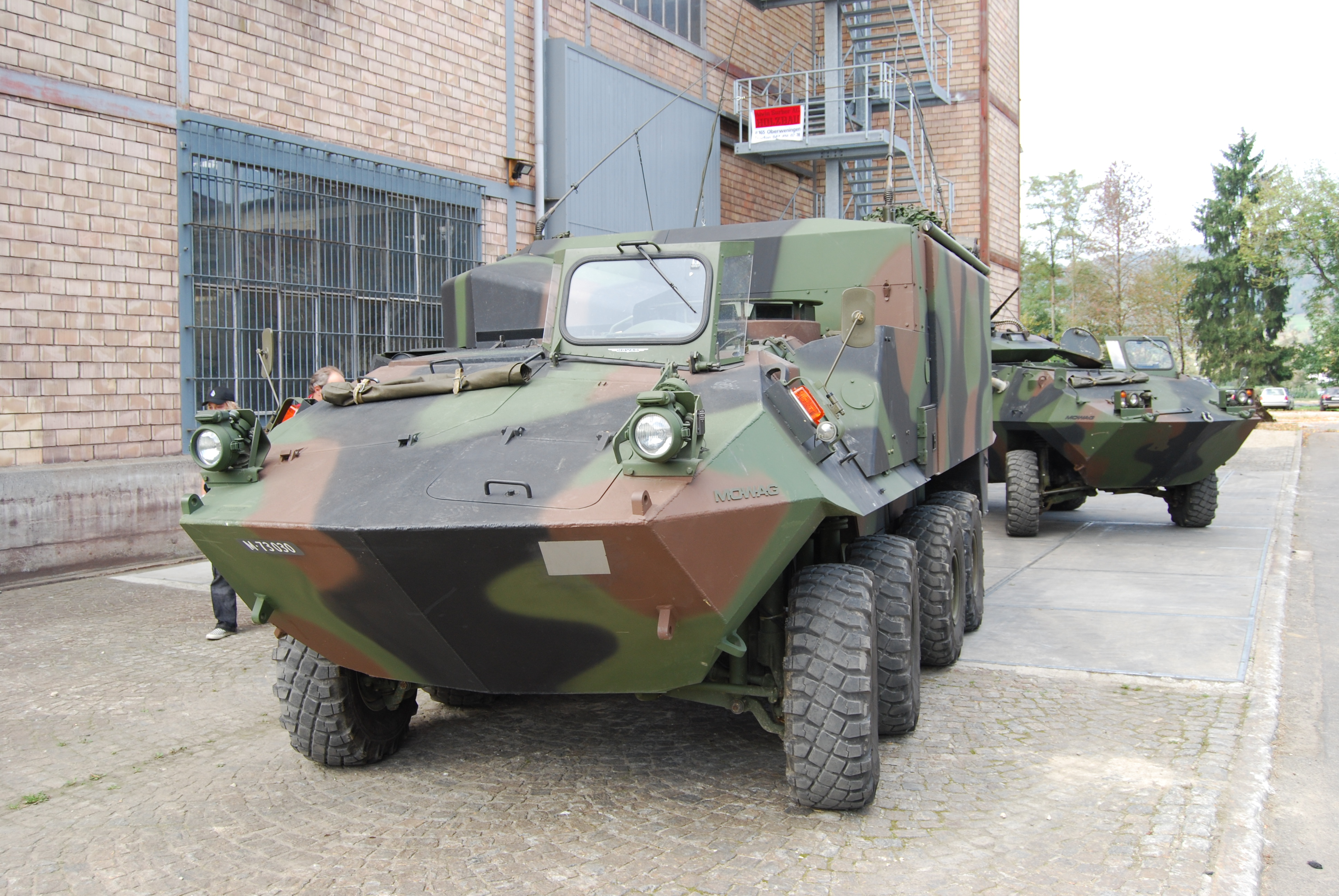 Piranha 8x8 im Schweizerischen Militärmuesum in Full AG